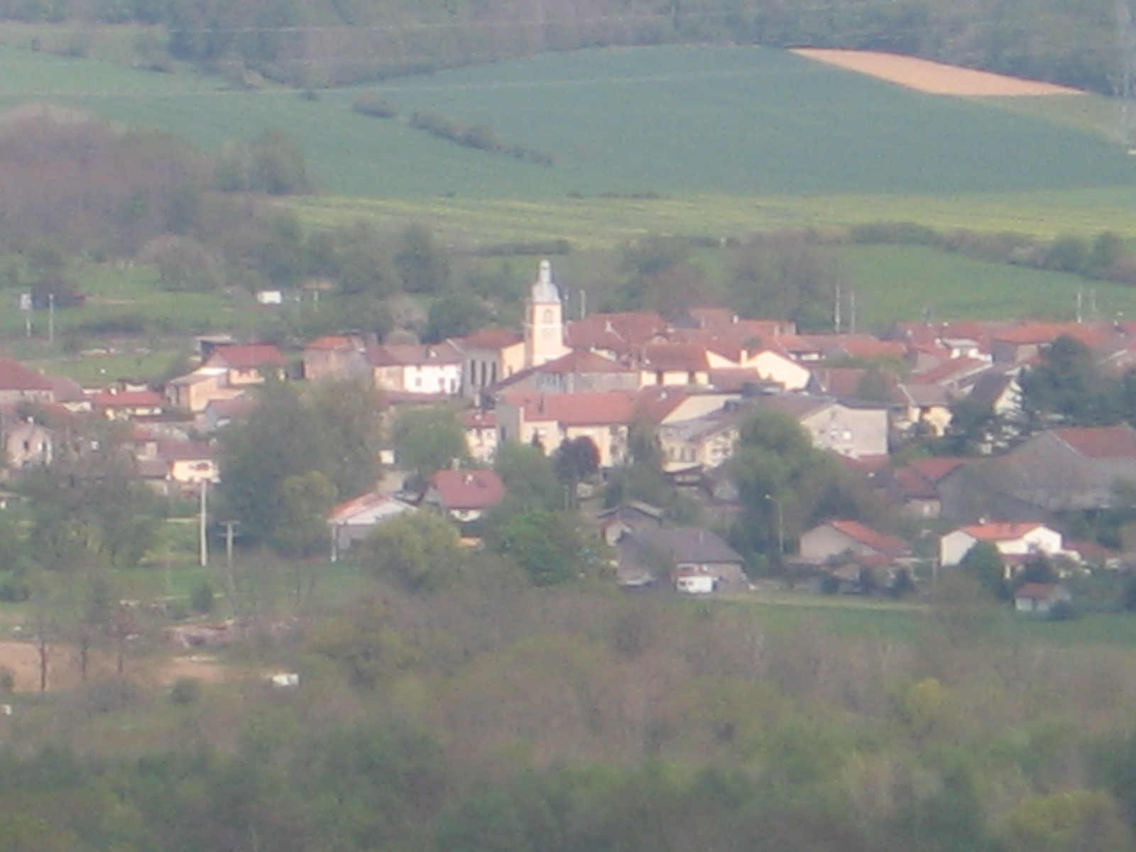 Essegney, view from Monument de Lorraine, may 2006